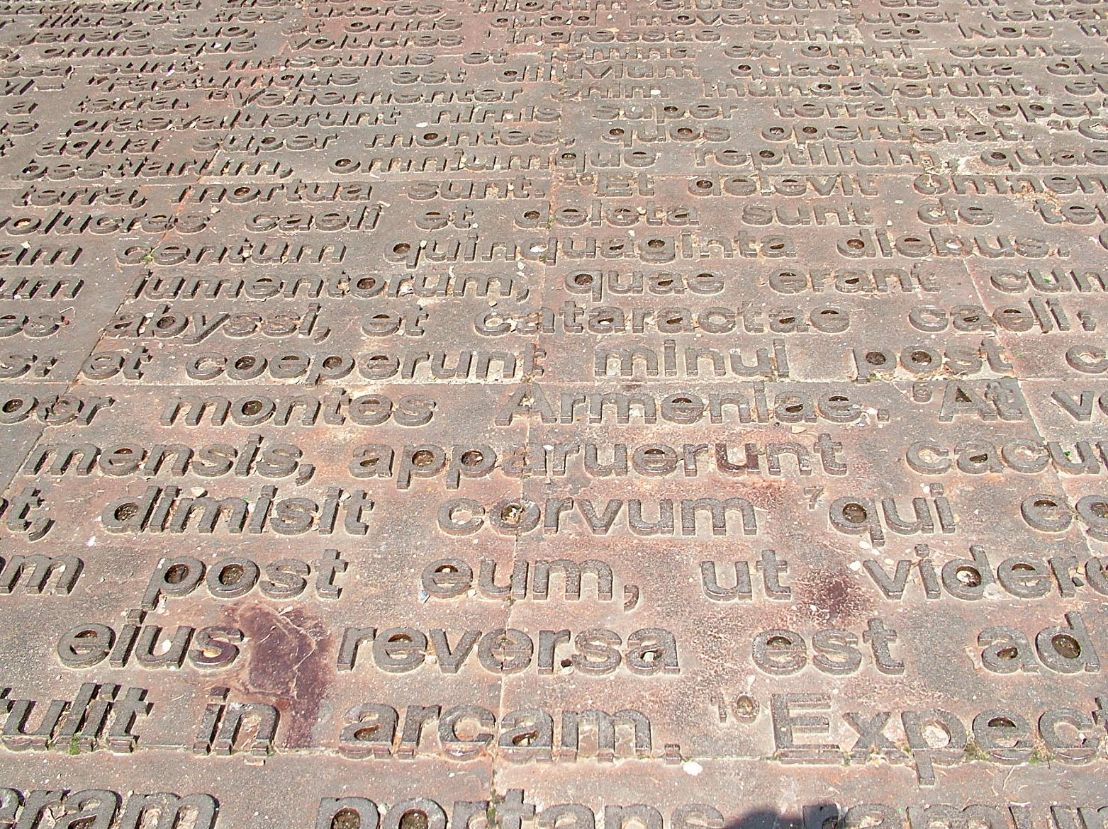 Détail de l'Escalier Monumental d'Auch (Gers France)